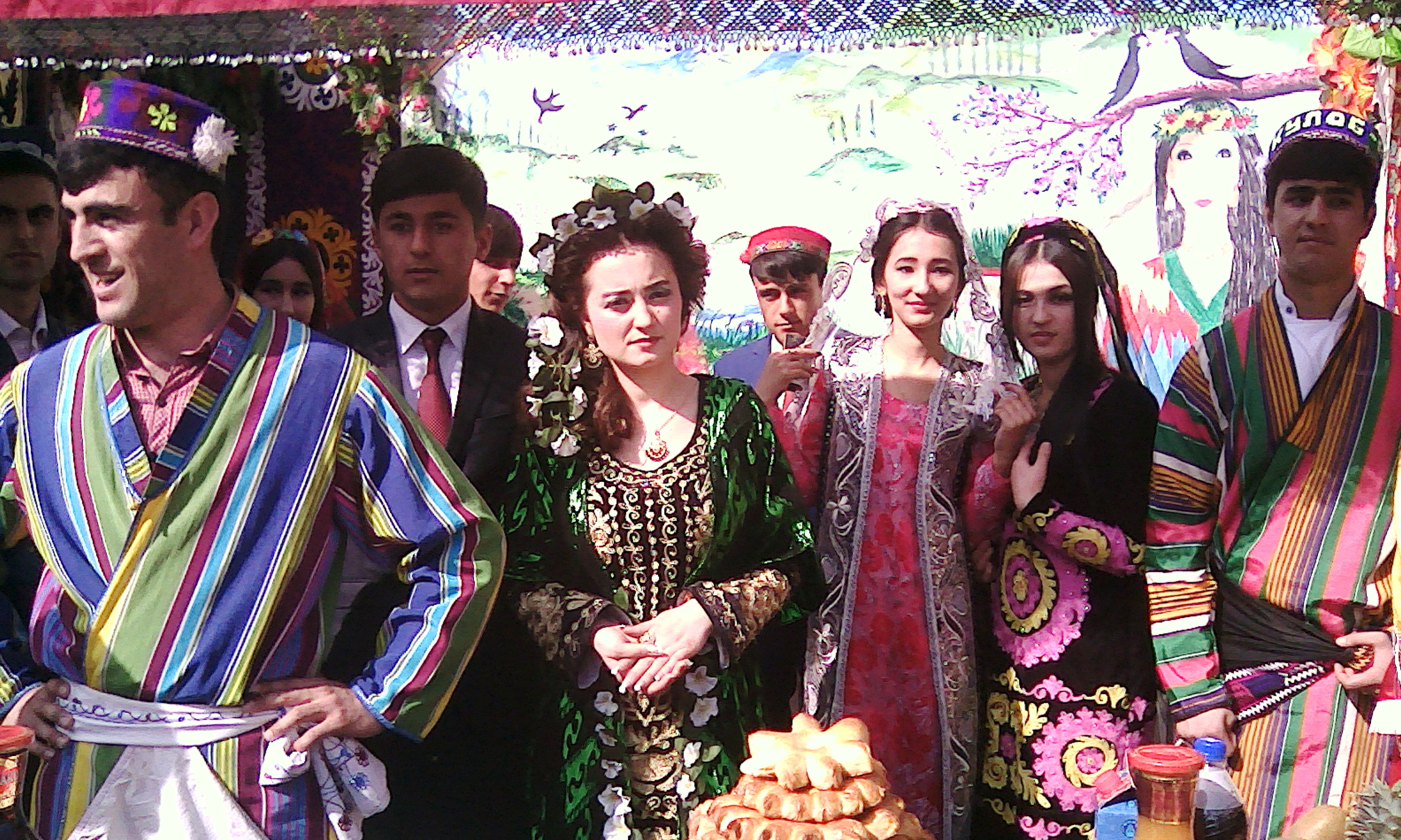 Праздничные гуляния в Таджикском национальном унивеситете, Навруз -2017г. Тоҷикӣ: Ҷашни Иди Наврӯз -2017 дар Донишгоҳи миллии Тоҷикистон